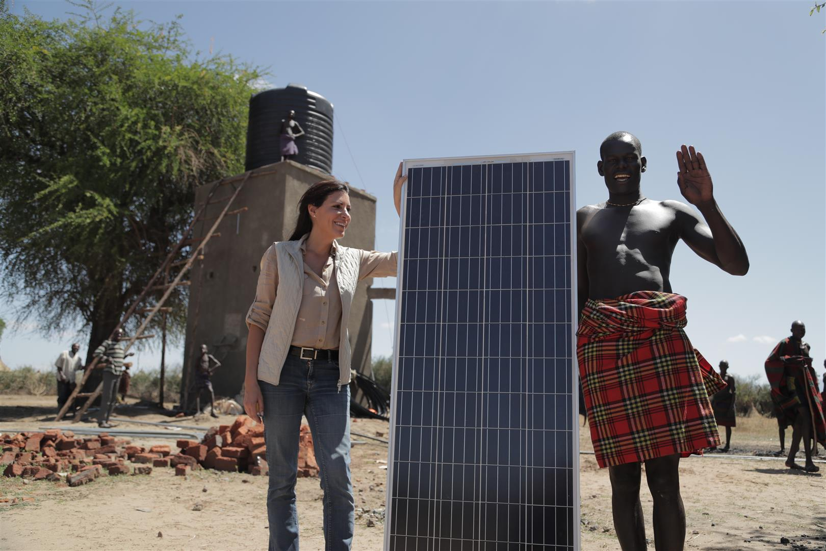 סיון מספקת לכפרים באפריקה אנרגיה סולרית בטכנולוגיה ישראלית